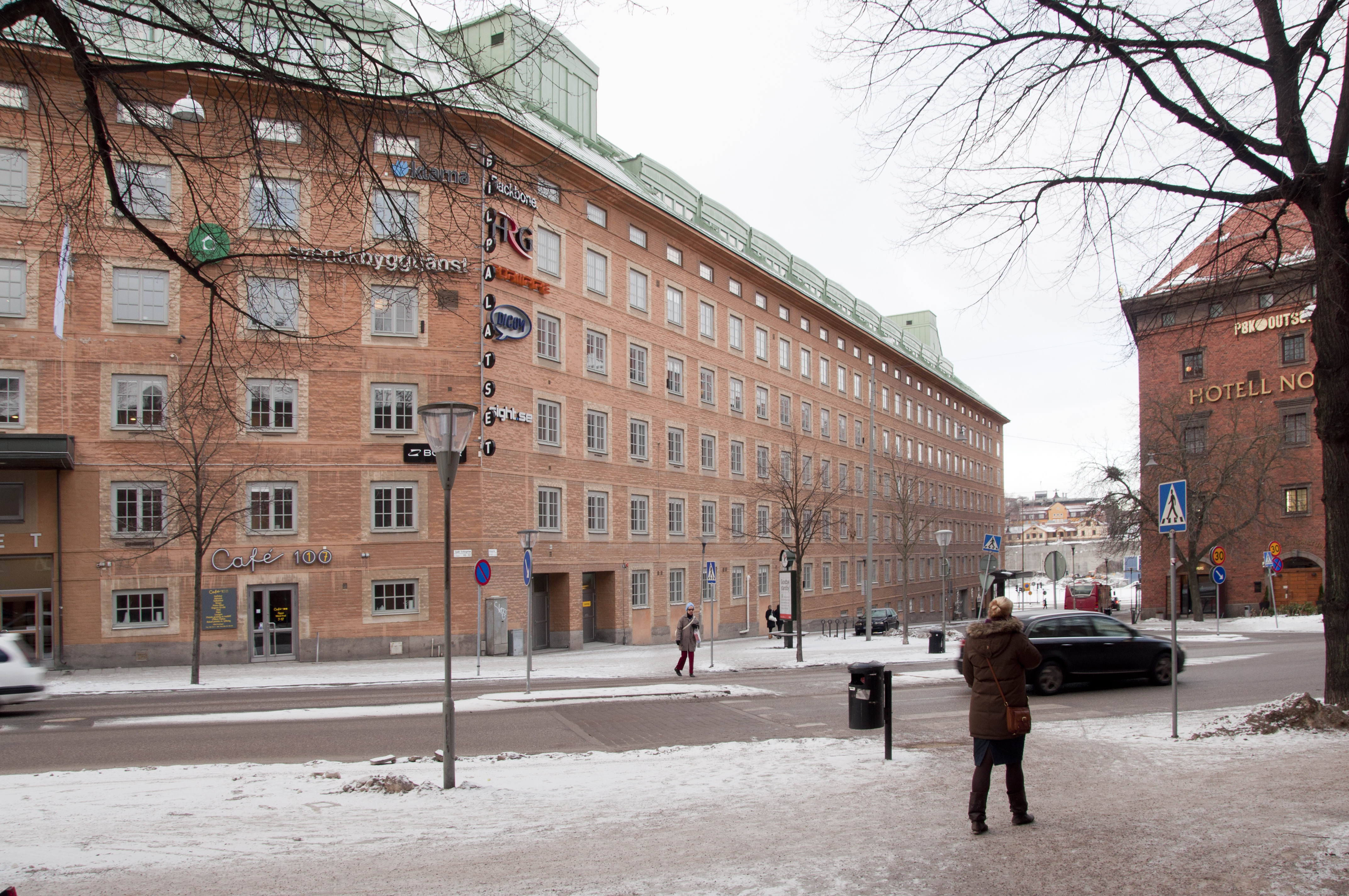 Automobilpalatset S:t Eriksgatan 117 / Dalagatan 61-63, Byggnadsår 1925-32, arkitekt Erik Amundson, byggherre Philipsons Automobil AB, byggmästare R Brink.